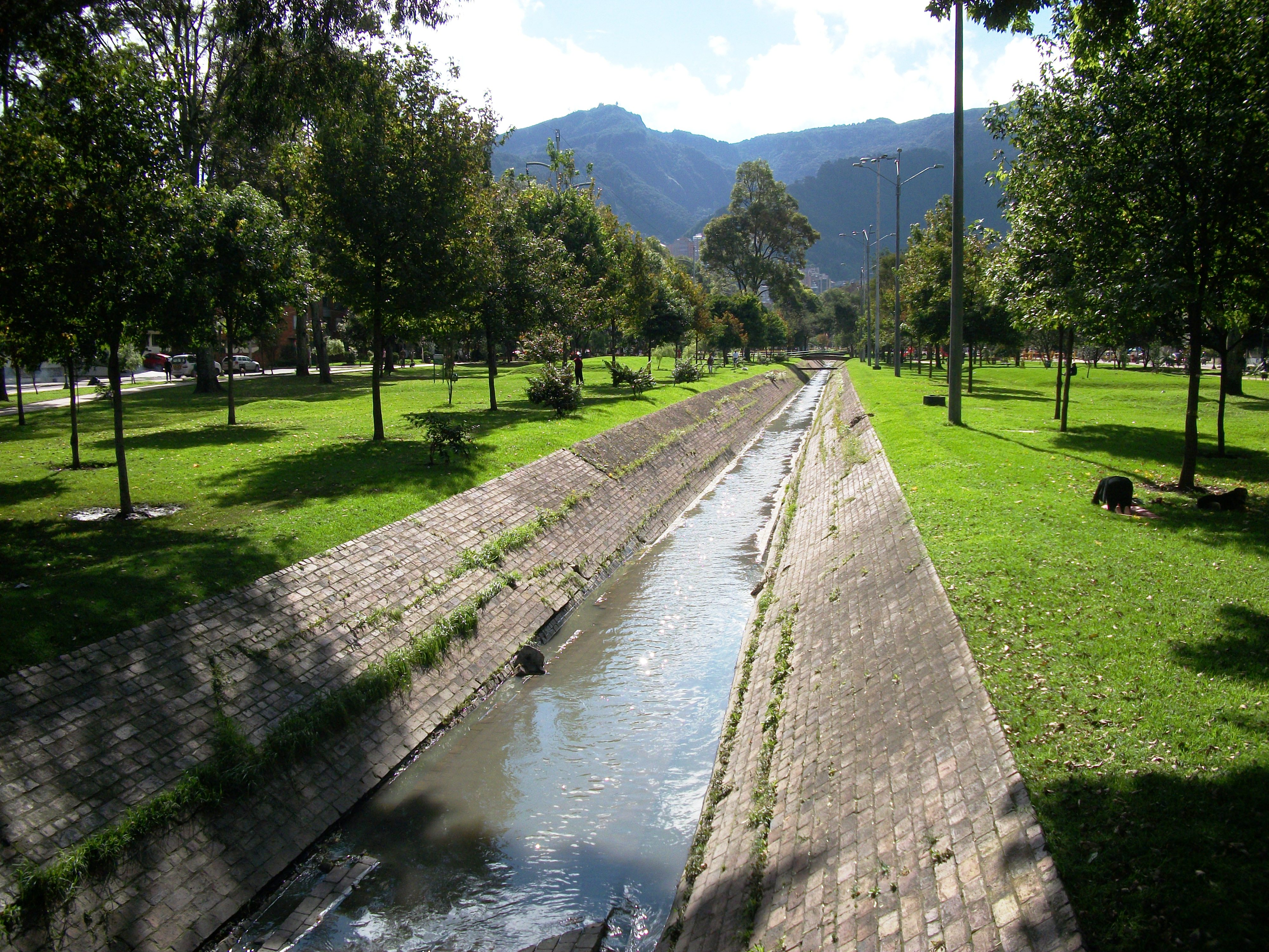 Parque El Virrey, cerca de la Autopista Norte. Bogotá.